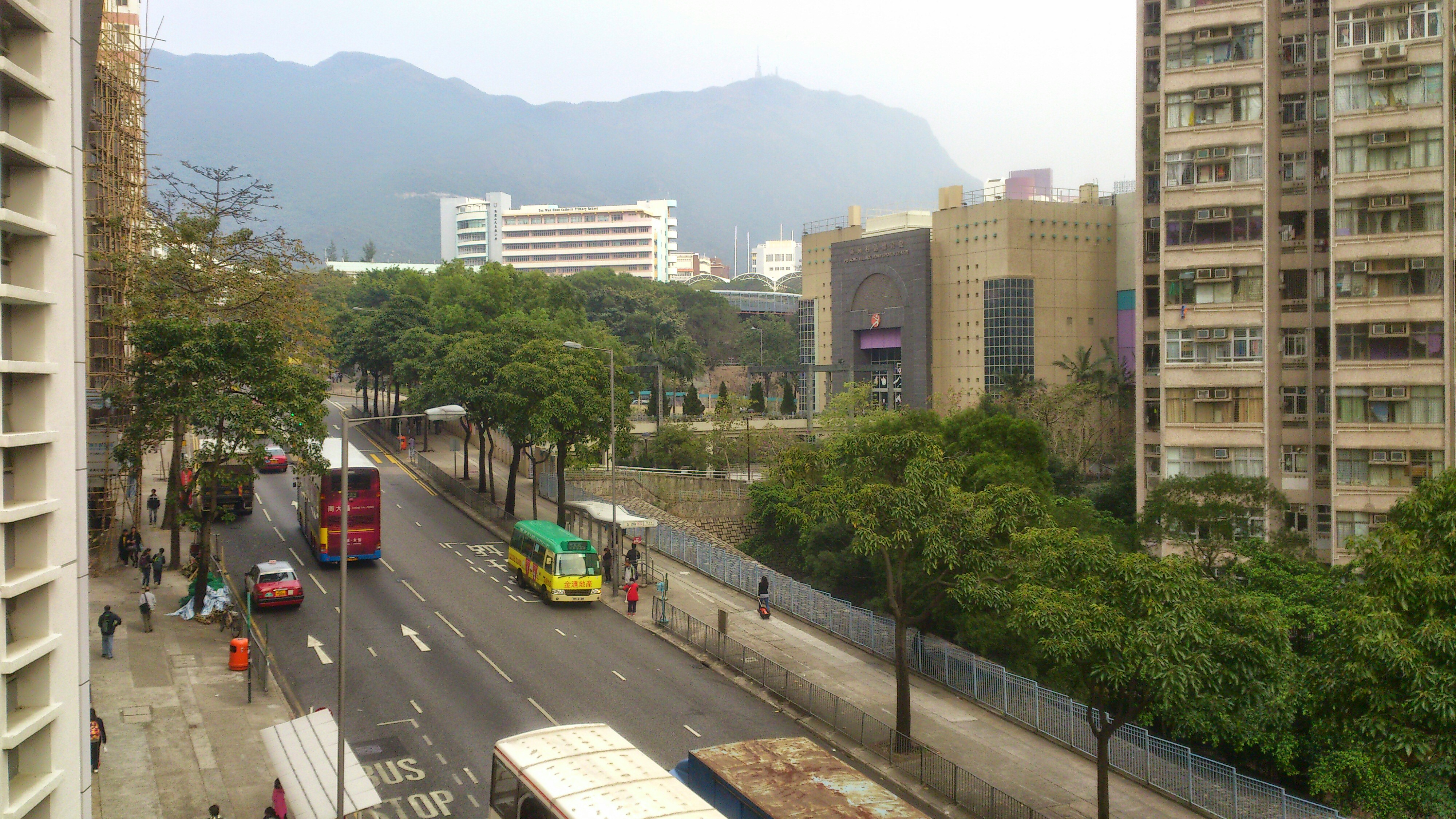 Diamond Hill, Hong Kong